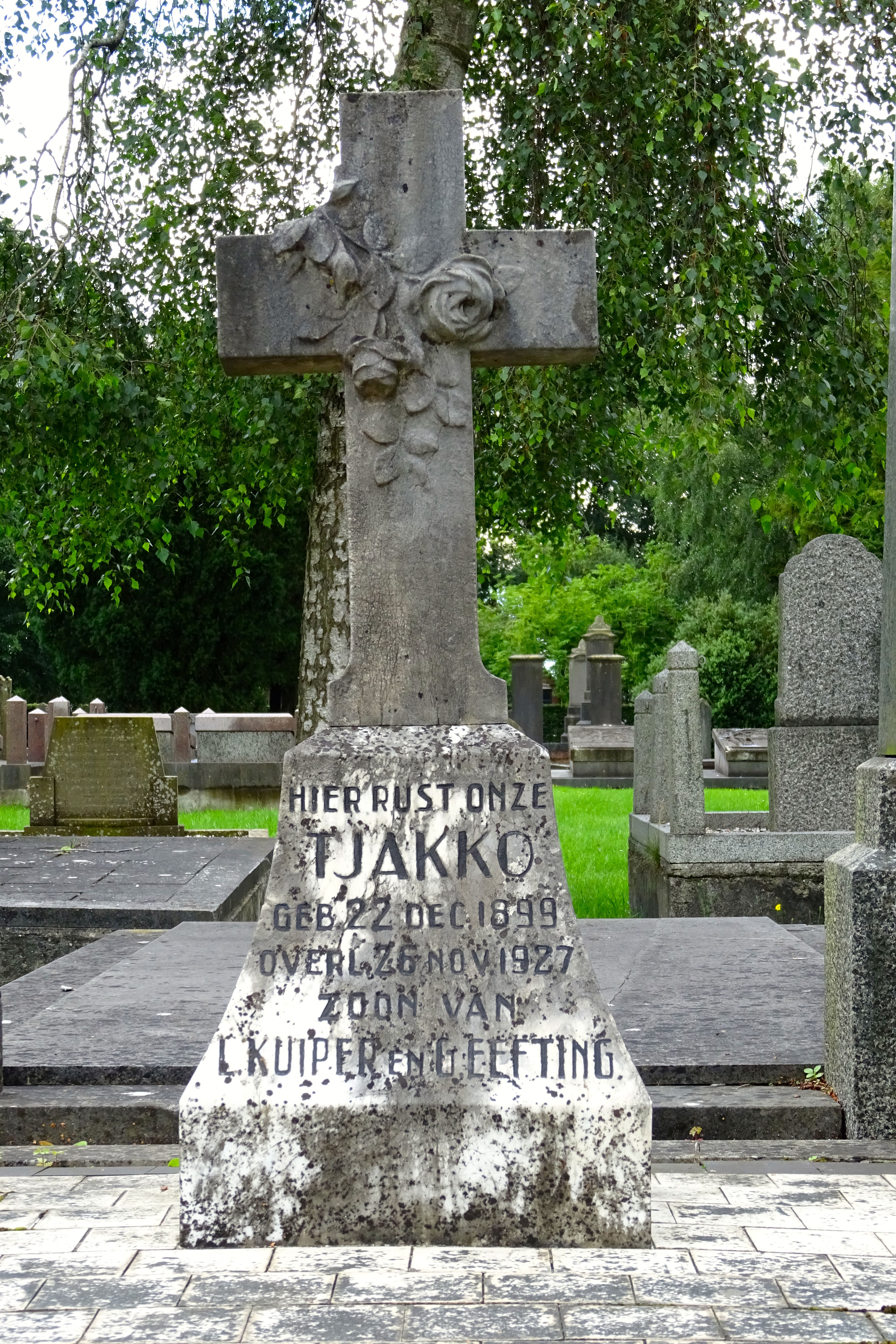 Grafmonument Tjakko Kuiper (1898-1927), abusievelijk is een verkeerd geboortejaar vermeld, zie geboorteakte